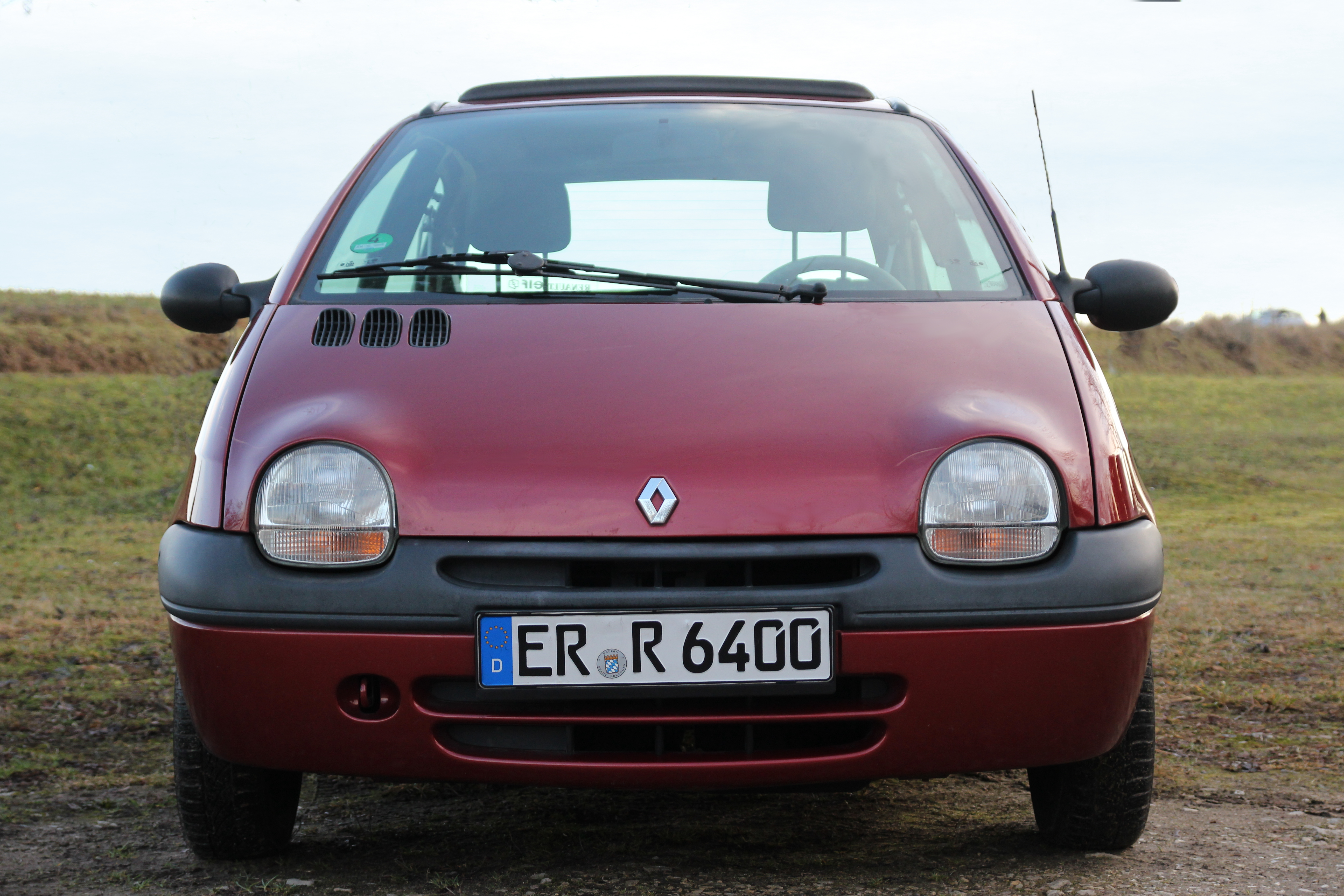 Twingo 1 Phase 2, Baujahr 08/1999 Faltdach, Kurzantenne, 13 Zoll Bereifung Das Kennzeichen wurde im Bild verändert und existiert nicht.